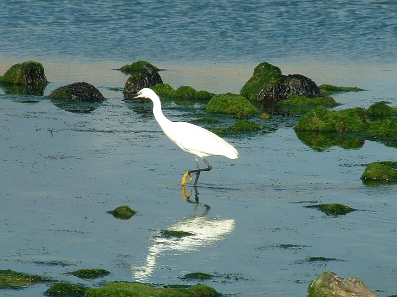 Aigrette garzette, Talmont-Saint-Hilaire